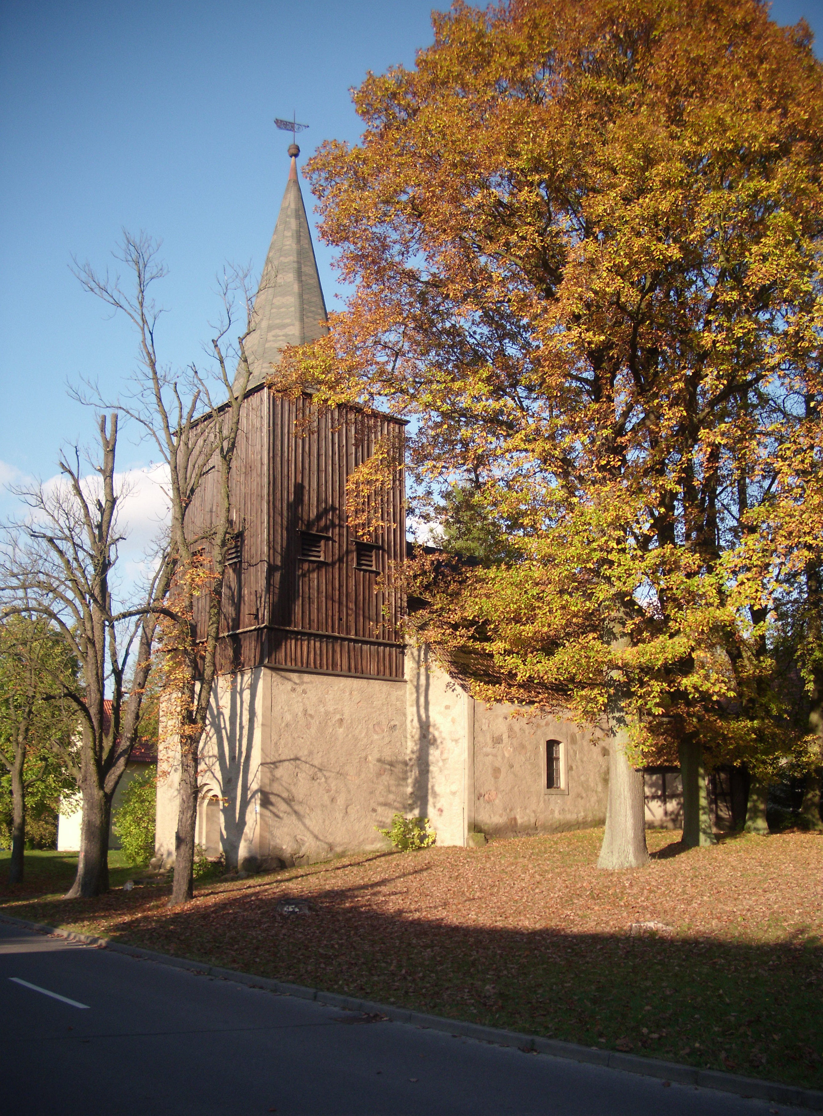 Kirche Groß Muckrow, Naturpark Schlaubetal, Brandenburg